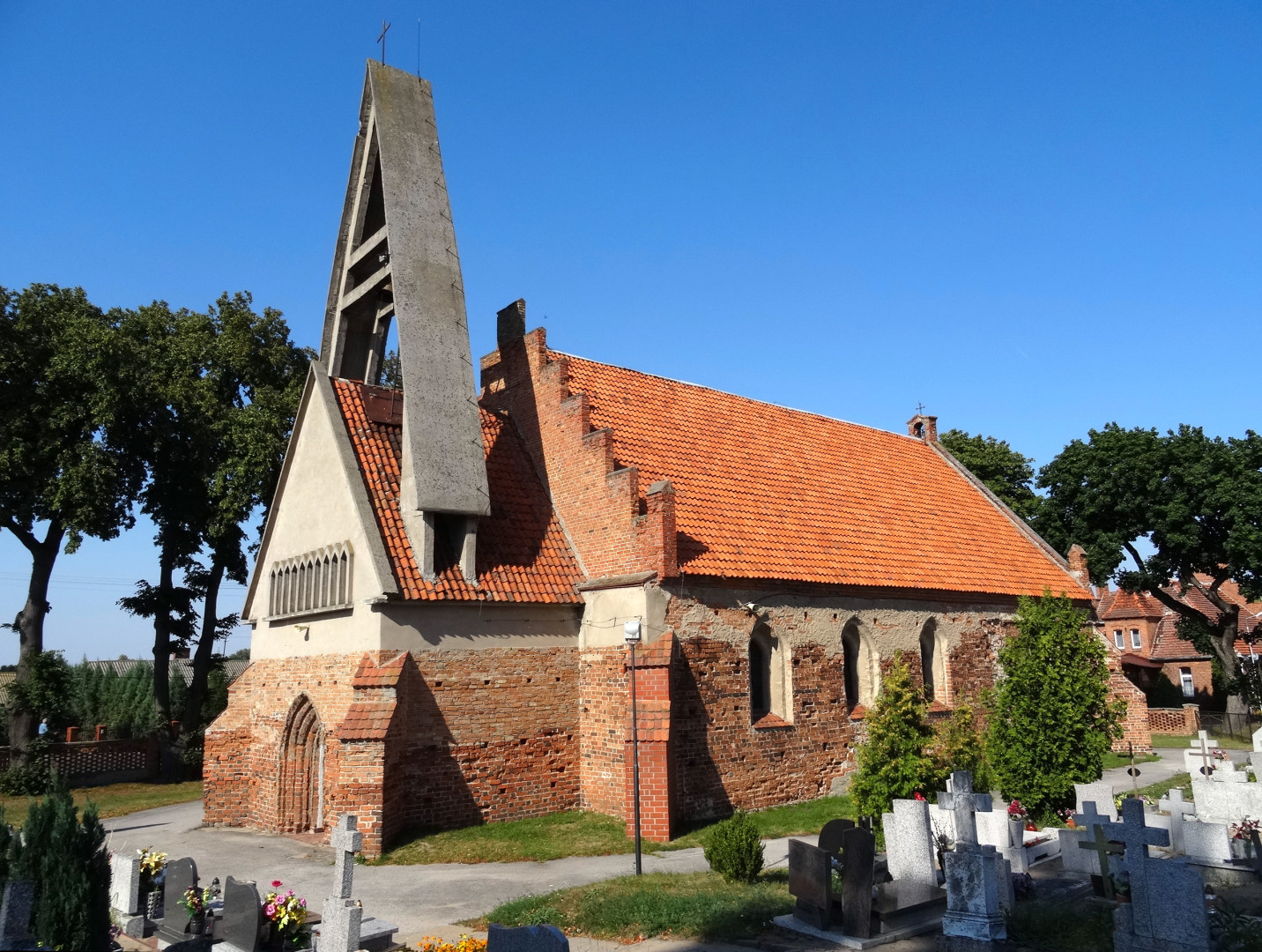 Kościół Narodzenia Najświętszej Marii Panny w Czarżu